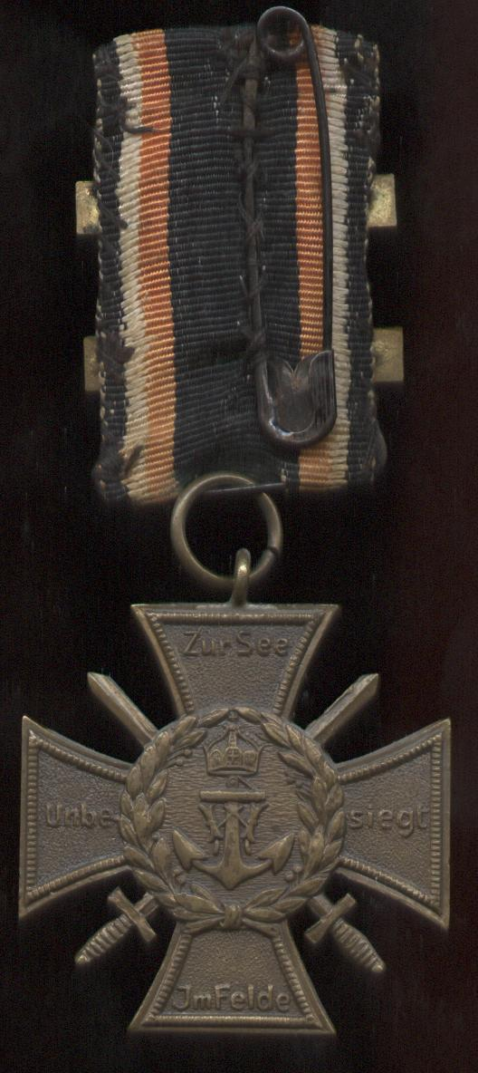 Flandernkreuz oder "Ehren- und Erinnerungskreuz des Marinekorps Flandern" (hier: Revers mit Wahlspruch "Zur See, im Felde, unbedsiegt"), deutsche Weltkriegsgedenkauszeichnung der Weimarer Republik (13.September 1921).